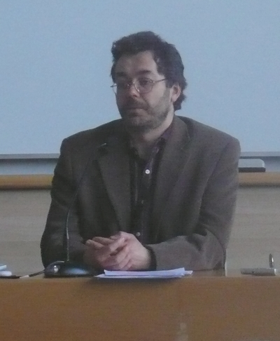 Anselm Jappe, Lyon, Journées Critiques, 18-20 mars 2010.